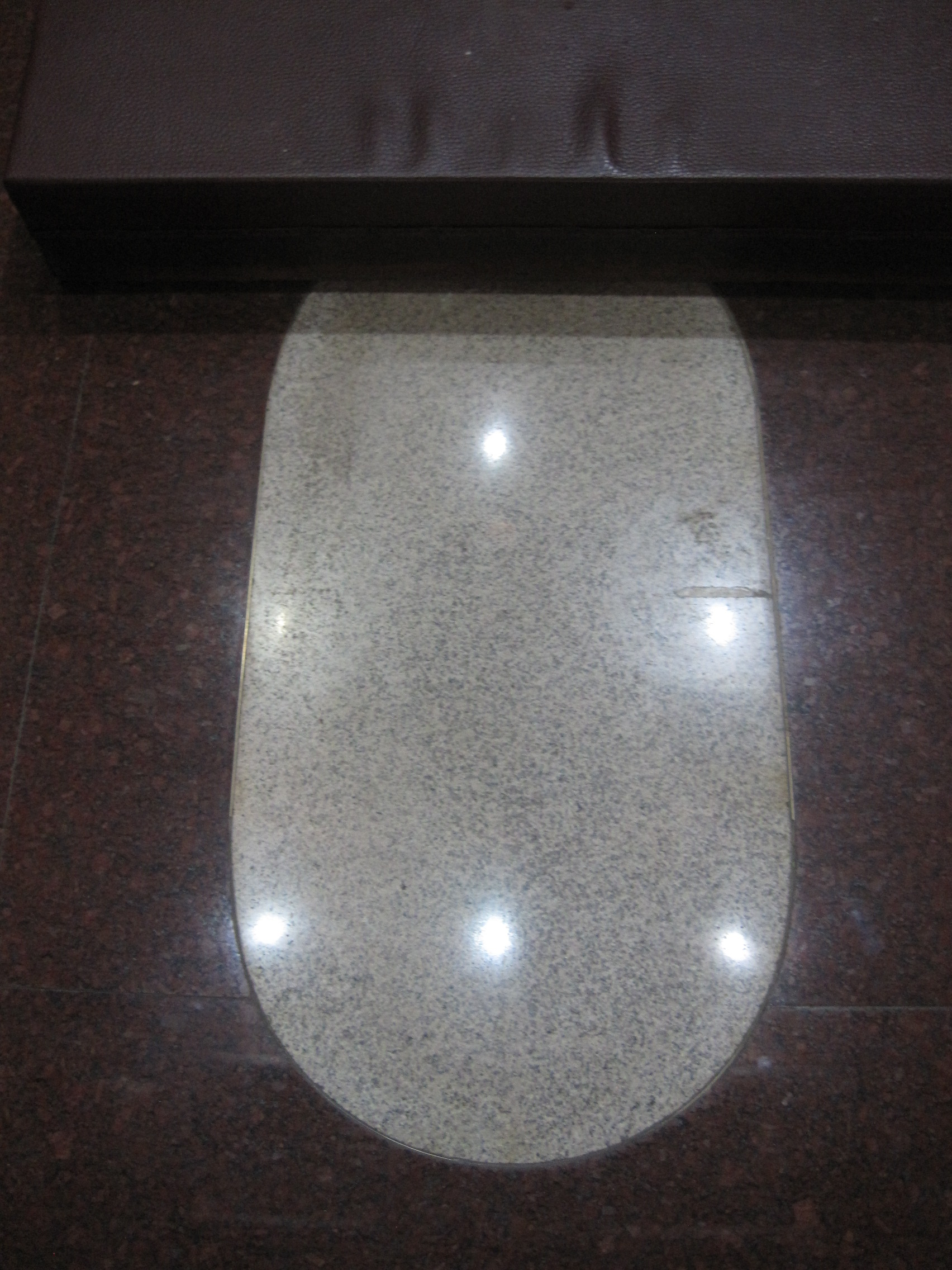 二府口福安宮鎮廟石